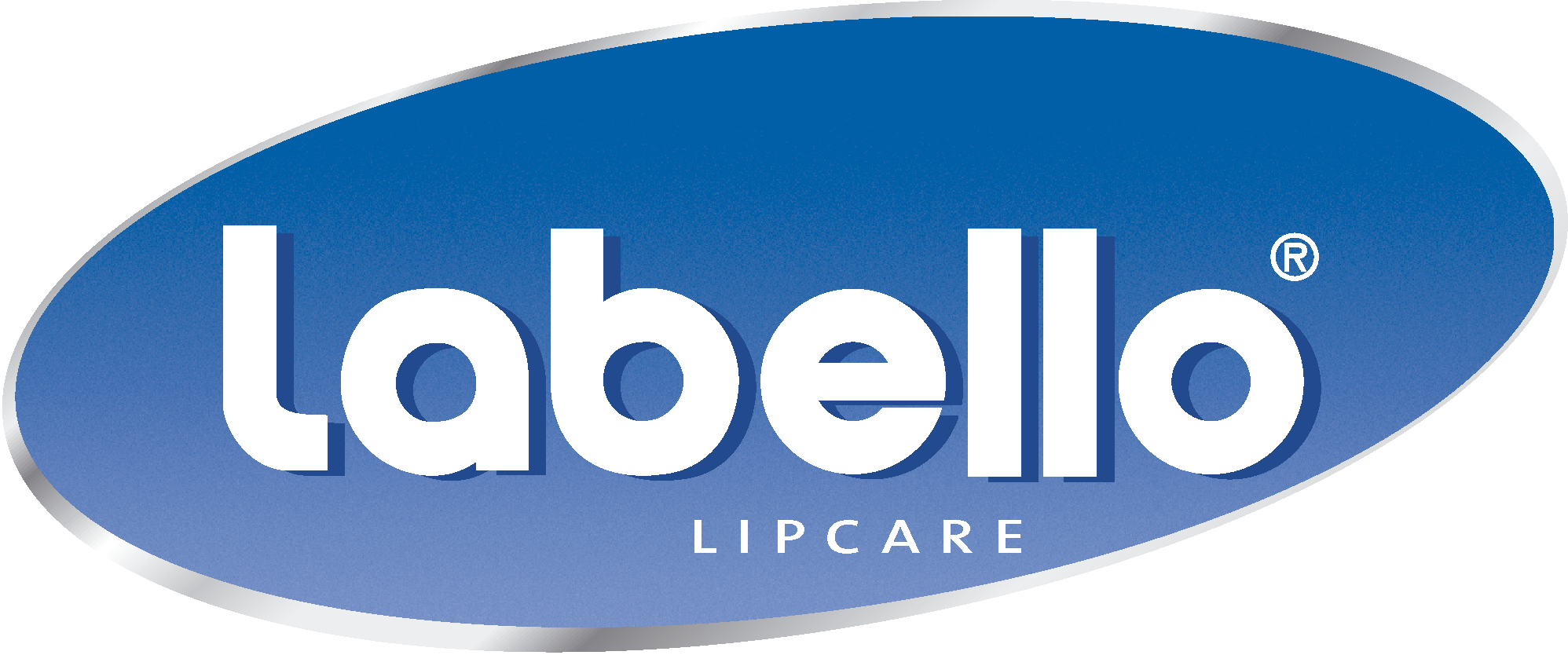 Labello-Lipcare-Logo